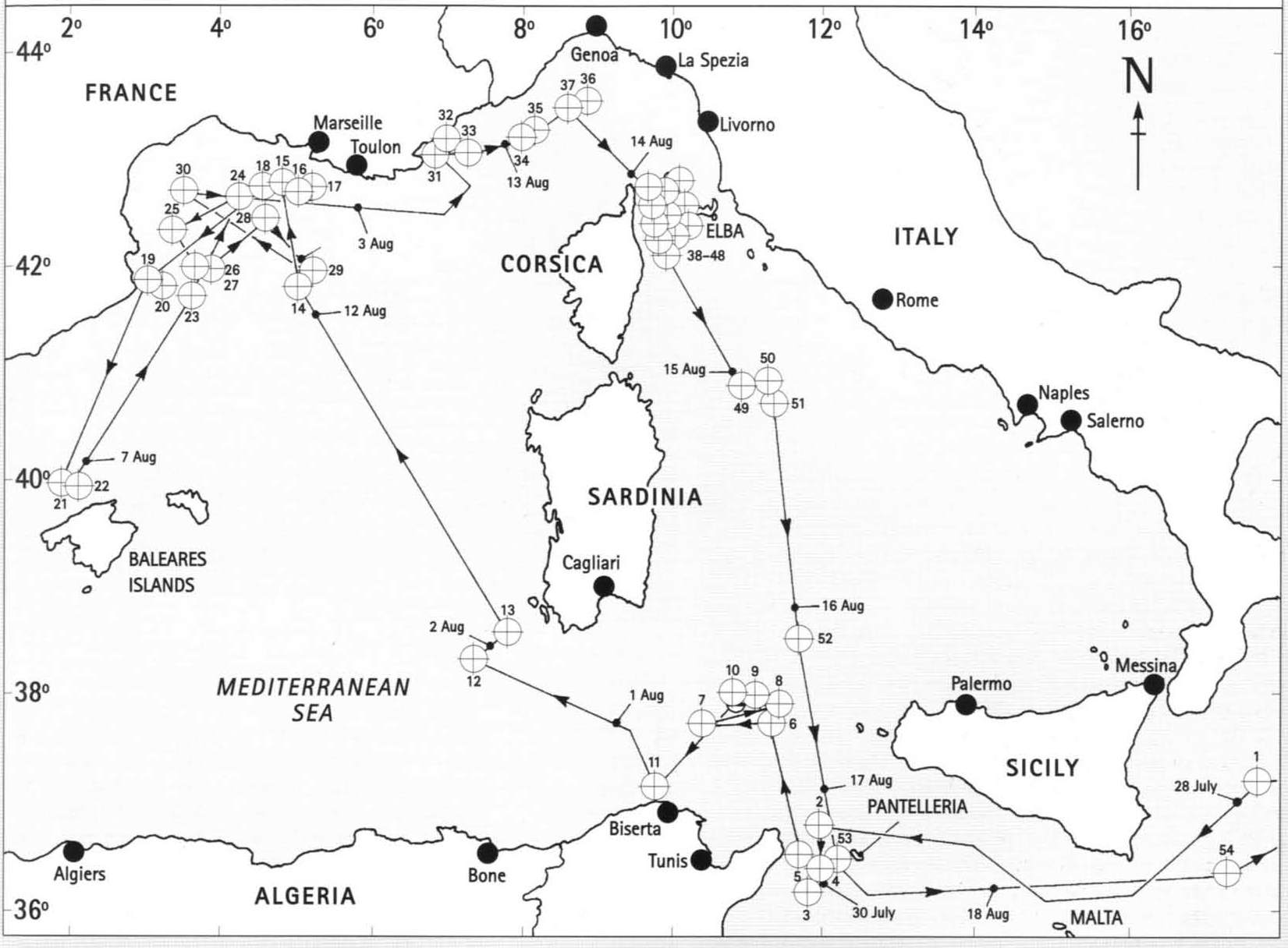 11-й боевой поход U-35